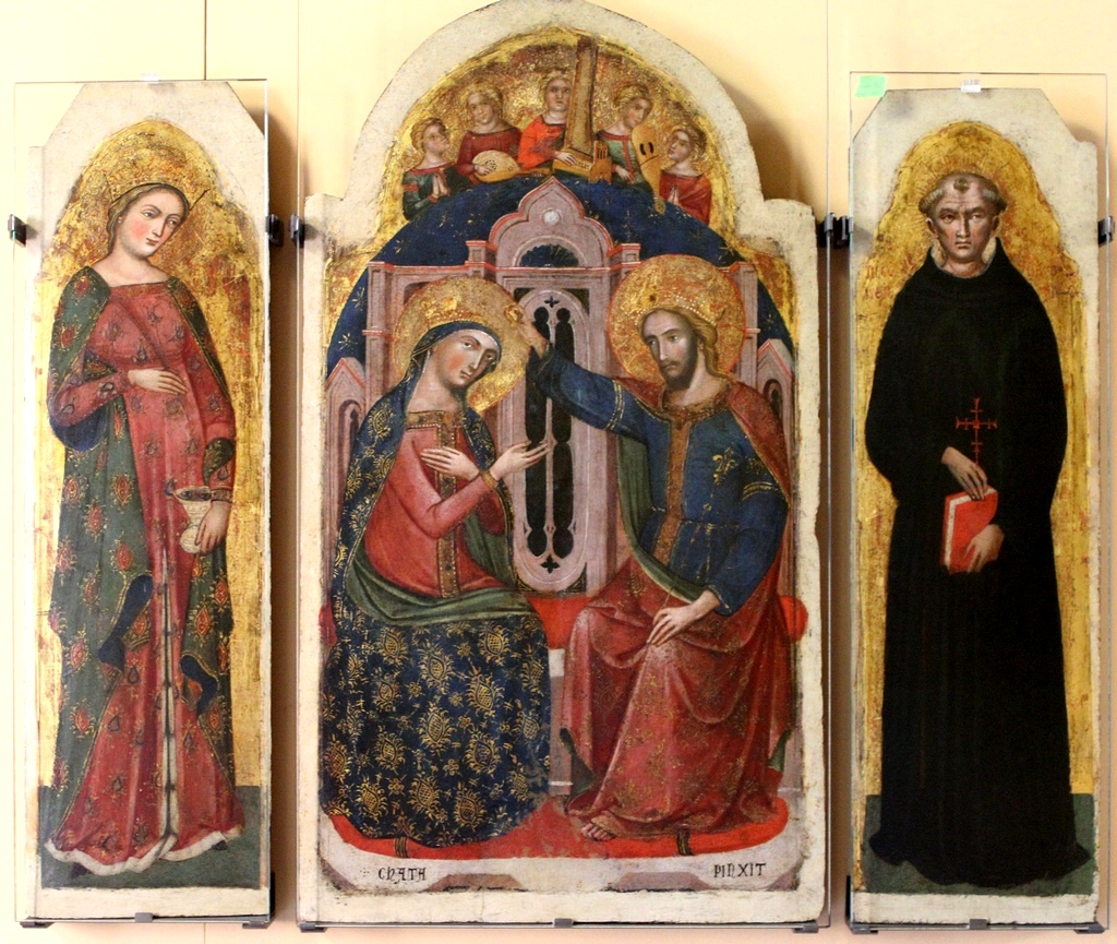 Incoronazione di Maria Vergine, Santa Lucia, San Nicola da Tolentino